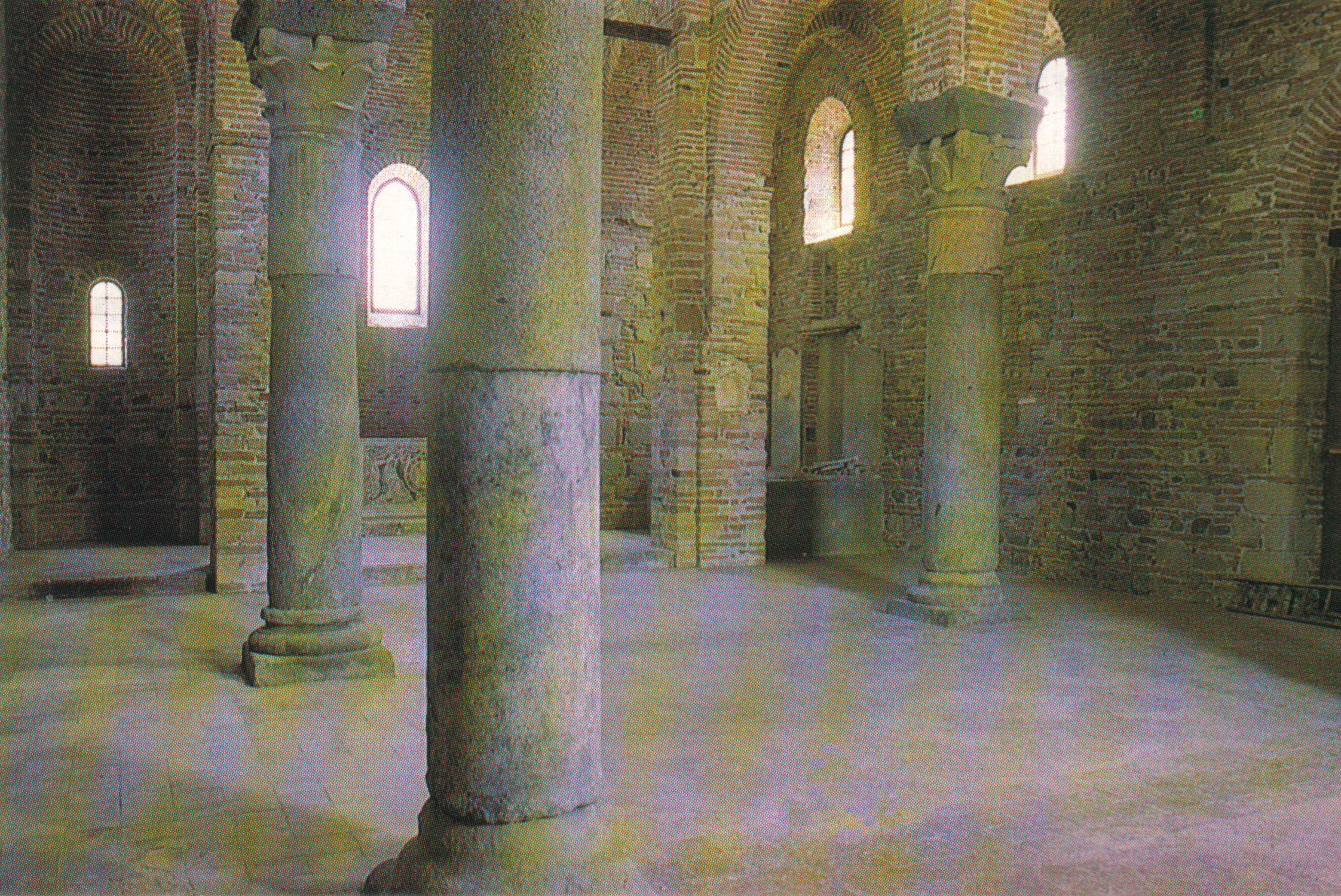 Interno della Chiesa dei Santi Pietro e Paolo di Casalvecchio.